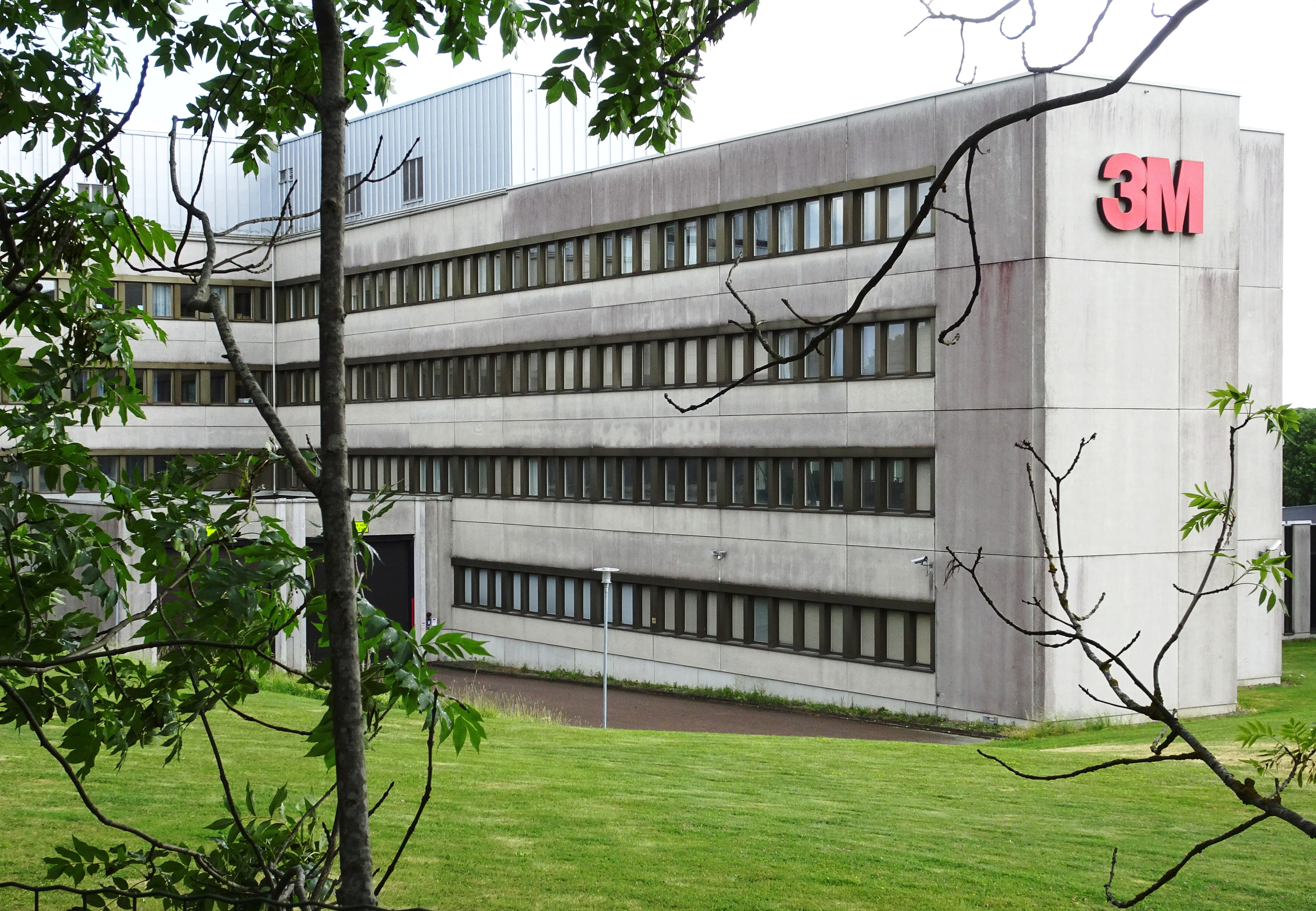 Kontorshus för 3M Company i Rotsunda